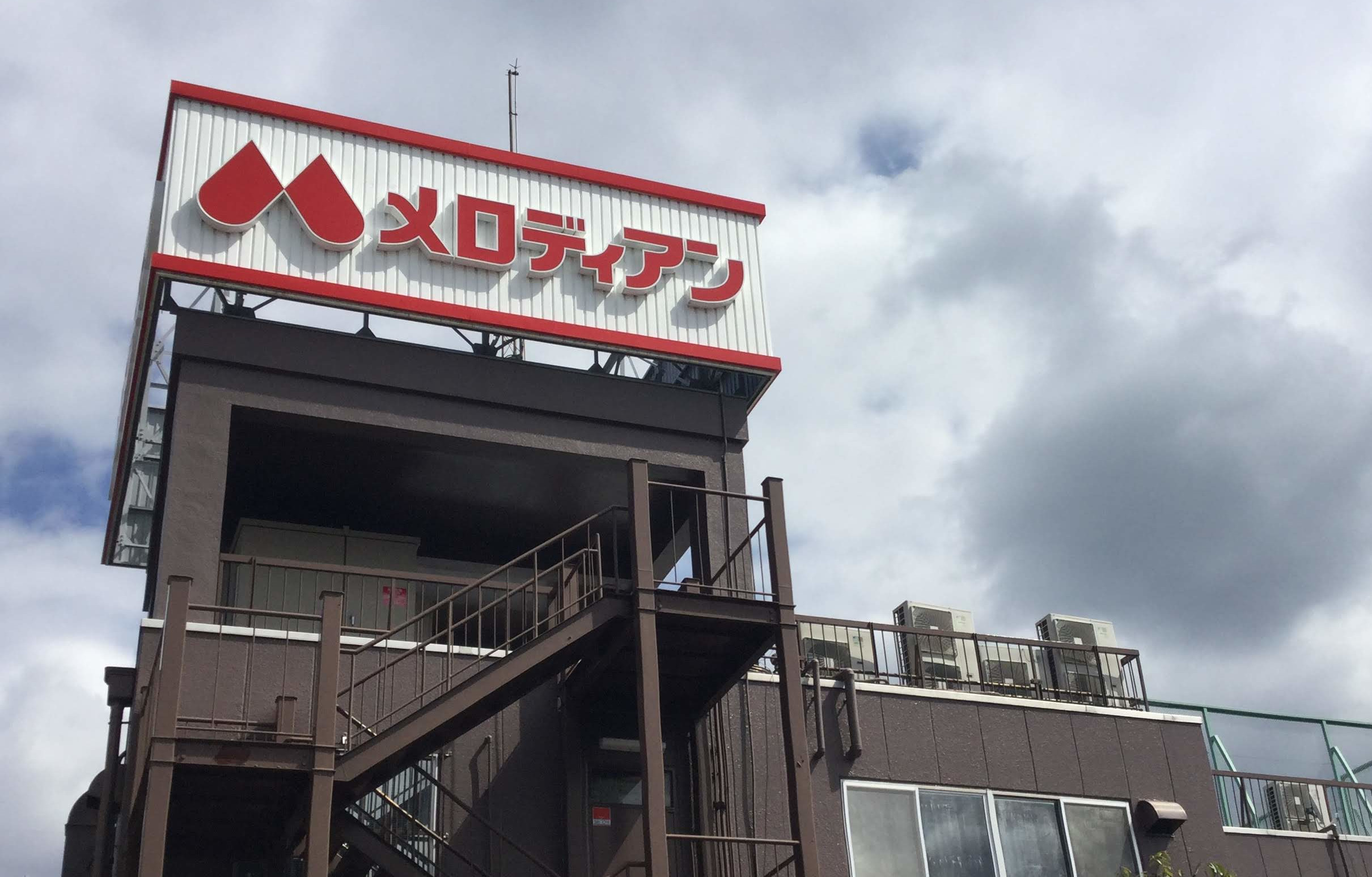 メロディアン本社。大阪府八尾市